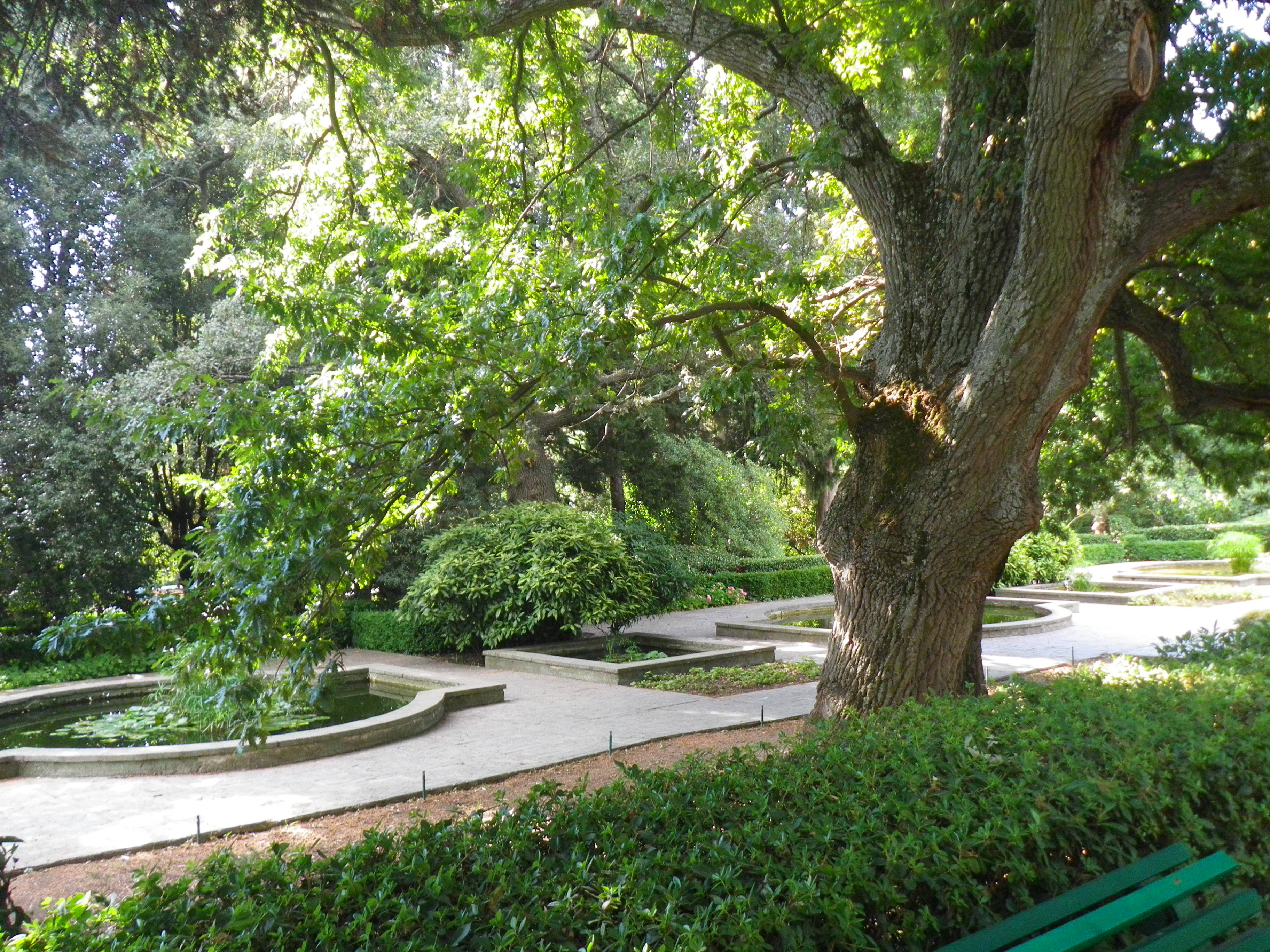 Нікітський ботанічний сад.